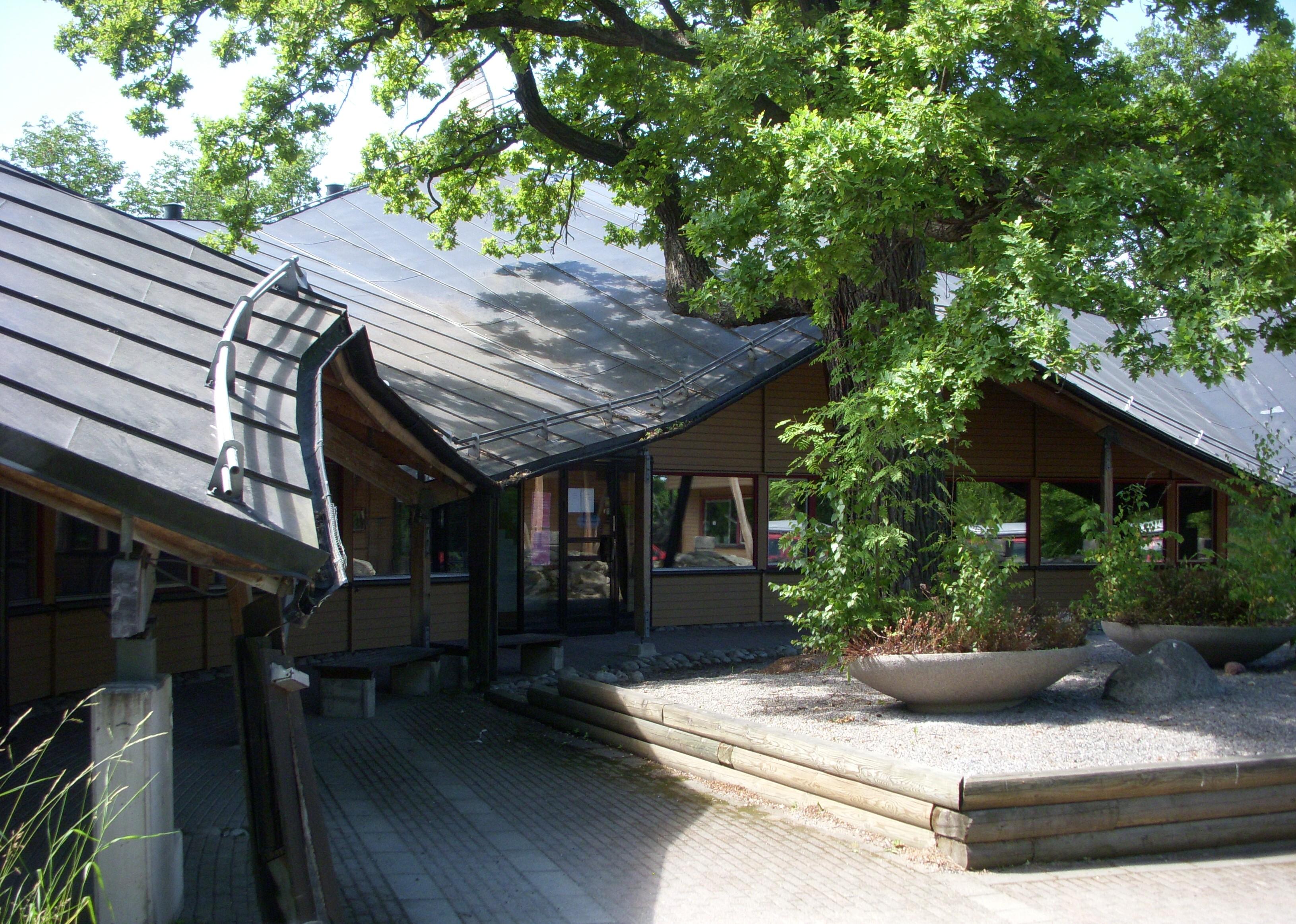 Juristerna hus, Stockholms universitet